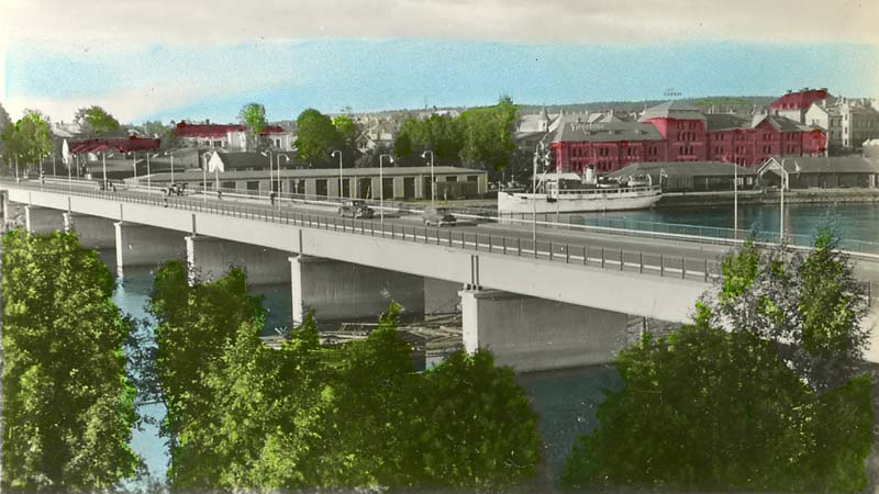 Tegsbron med Finlandsbåten. Handkolorerad variant av ac1127.; Bro; Byggnadsverk; Kommunikationsväsen; Miljöer; Stadsmiljö